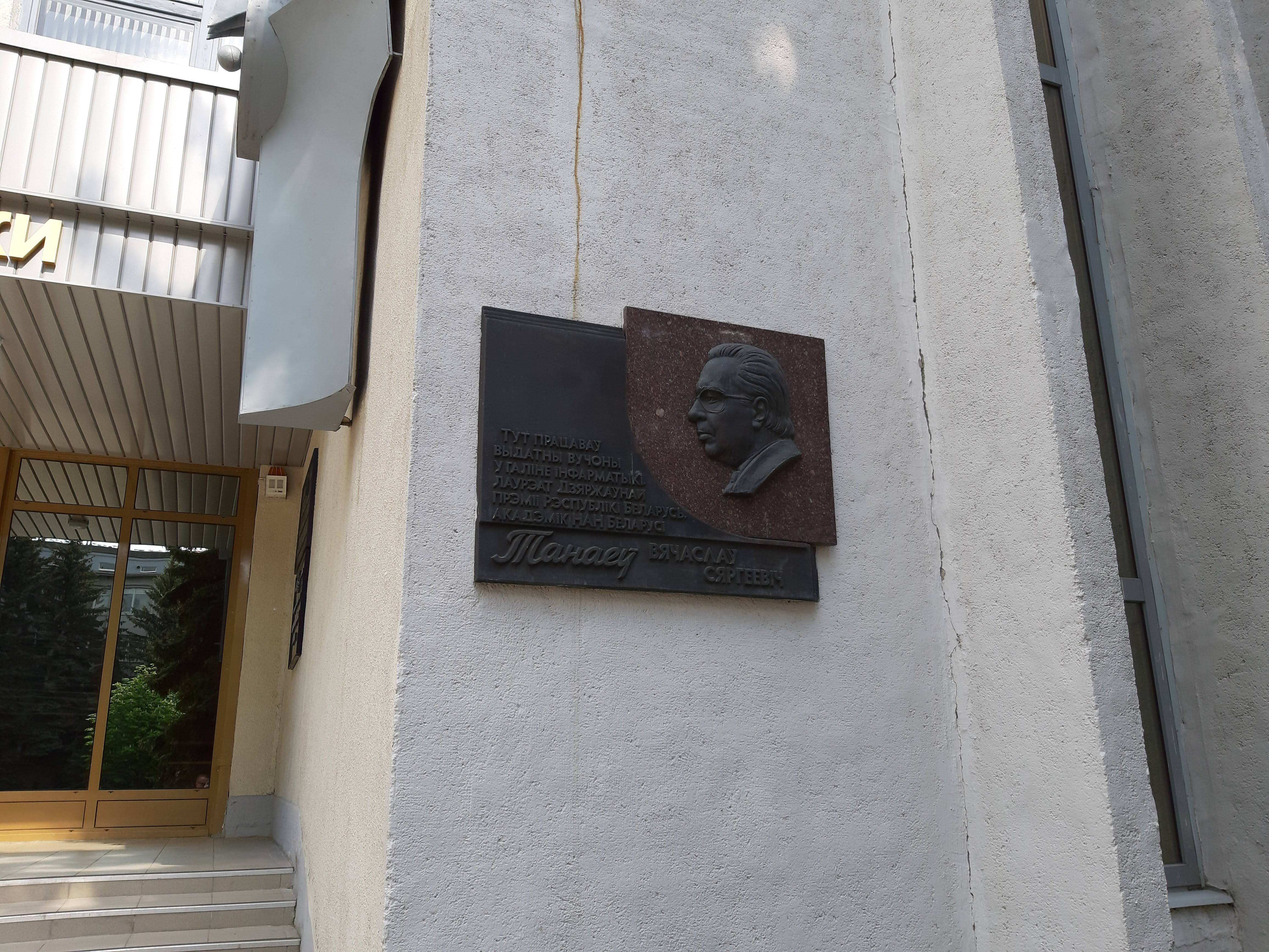 Мінск. Па Сурганава ў маі 2019